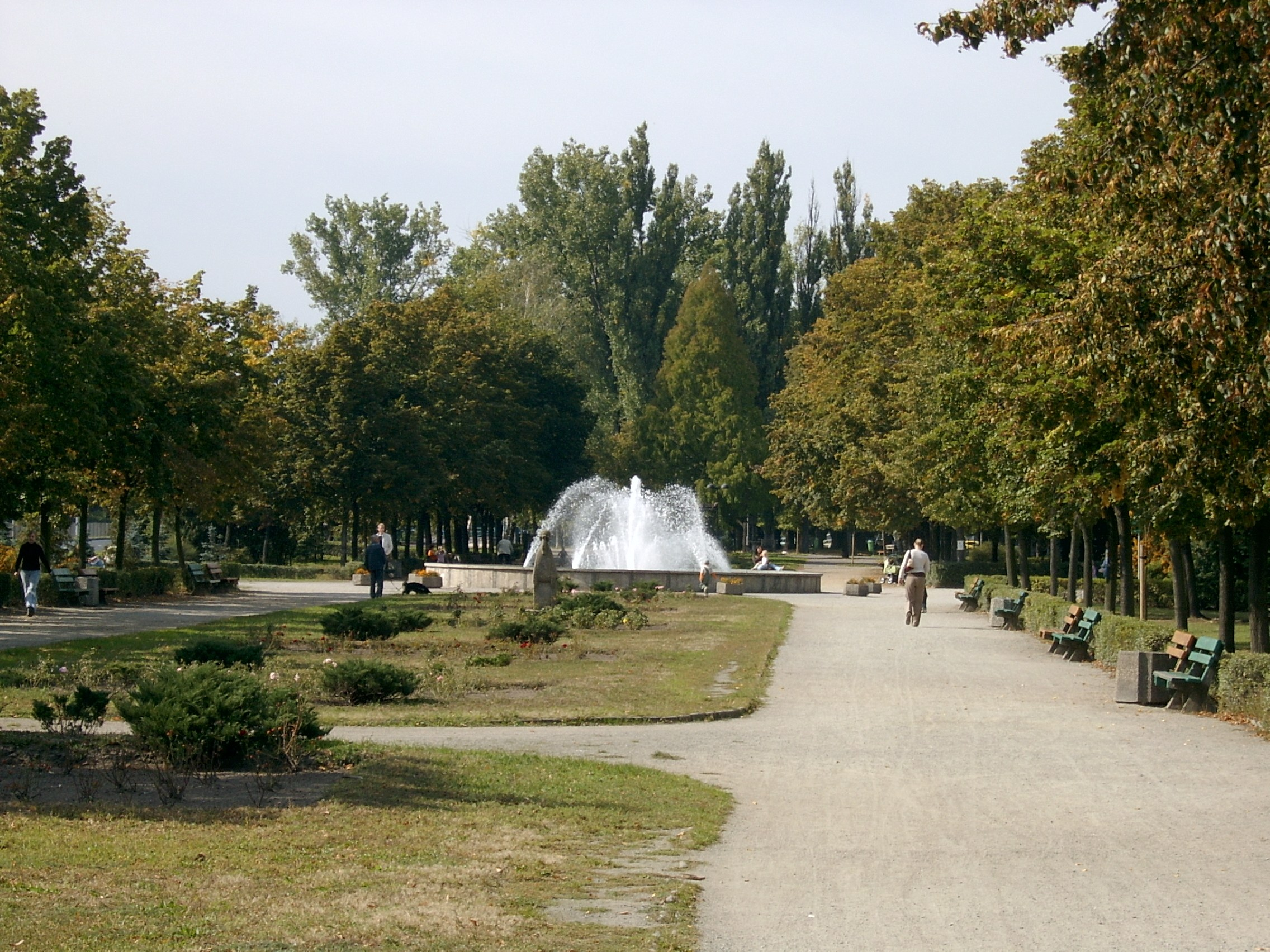 Fontanna w Lesznie, w Parku im. Jana Jonstona widziany od ul. Westerplatte.